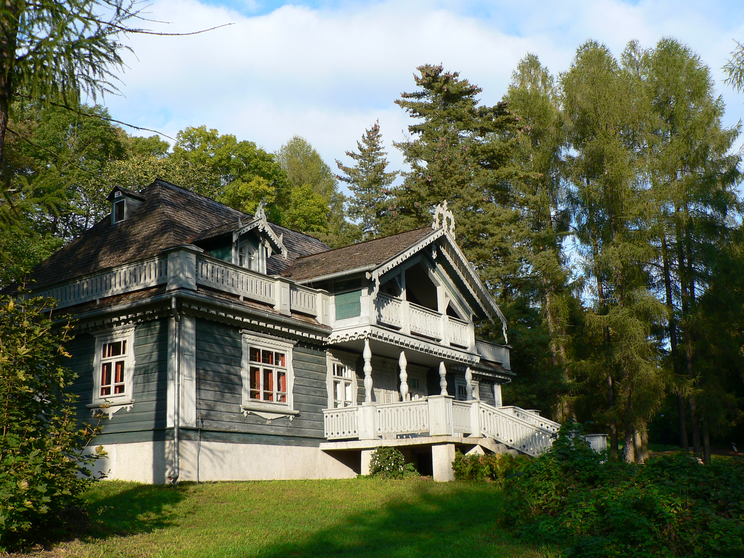 Pałacyk "Myśliwski" w Białowieży